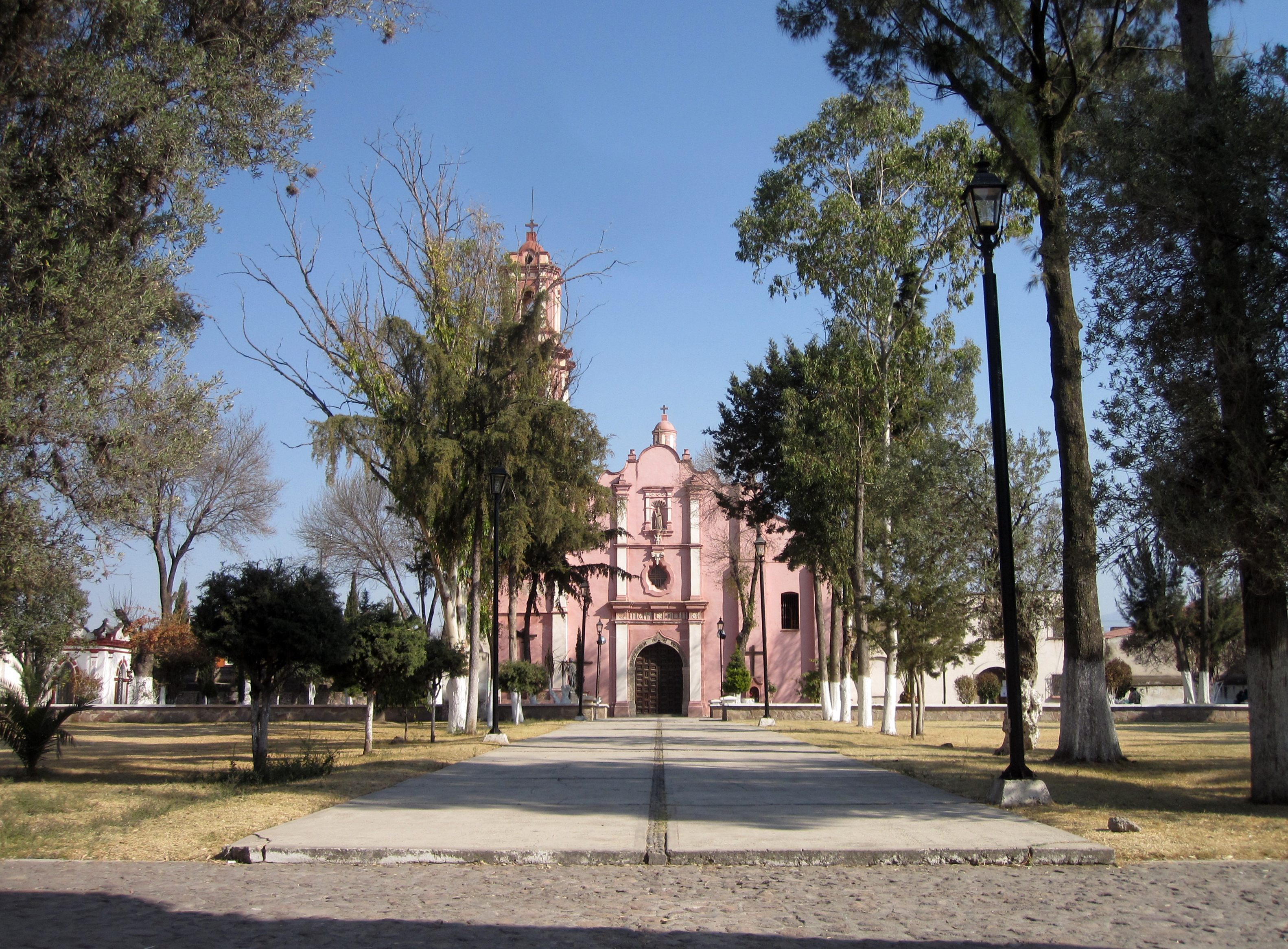 Kirken i Papalotla i delstaten México i Mexico